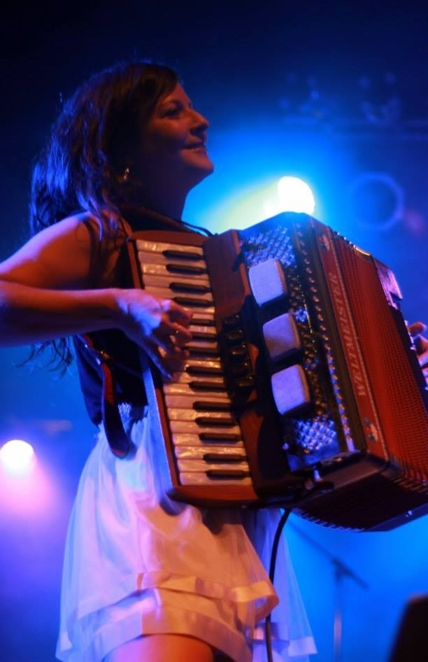 Marie-Annick Lépine lors d'un concert des Cowboys Fringants à Saint-Antonin